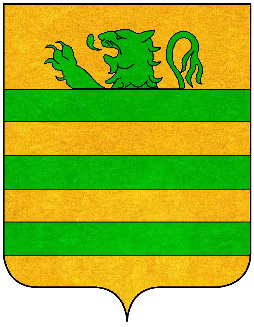 Stemma della famiglia Ordelaffi (FOrlì)